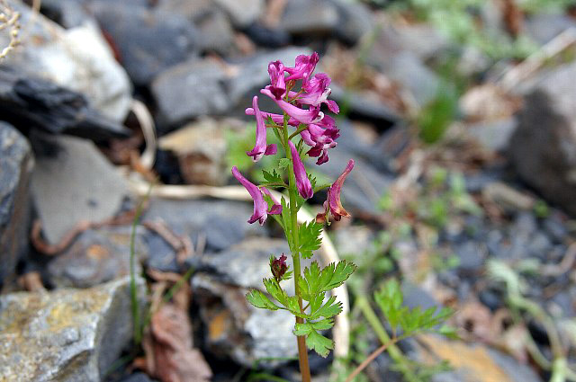 ムラサキケマン（静岡市葵区） Corydalis incisa (Aoi-ku, Shizuoka, Japan)